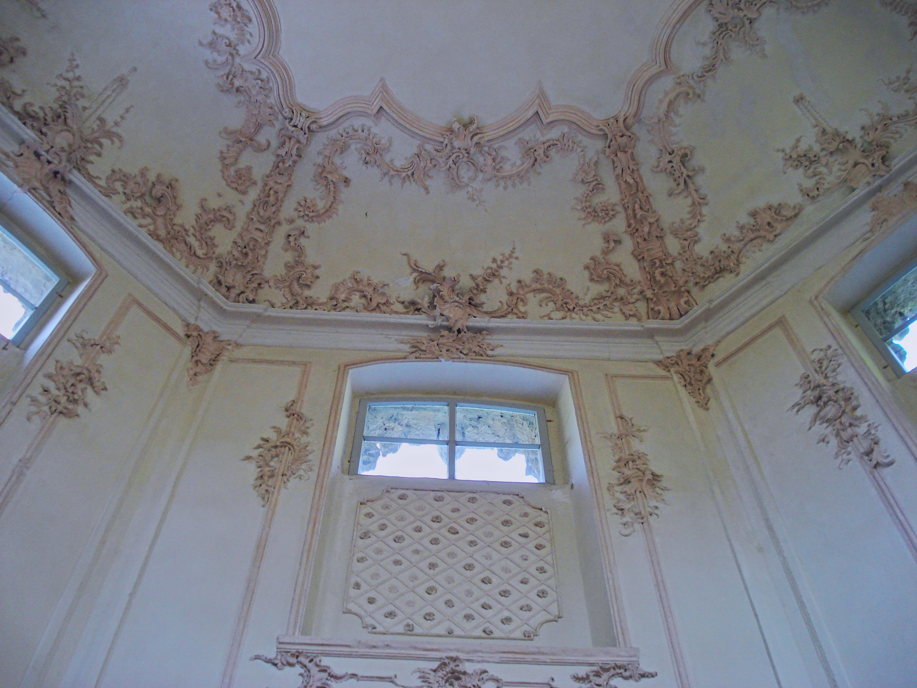 Deckenstuck des Saals im Morgenländischen Bau, Sanspareil, Deutschland